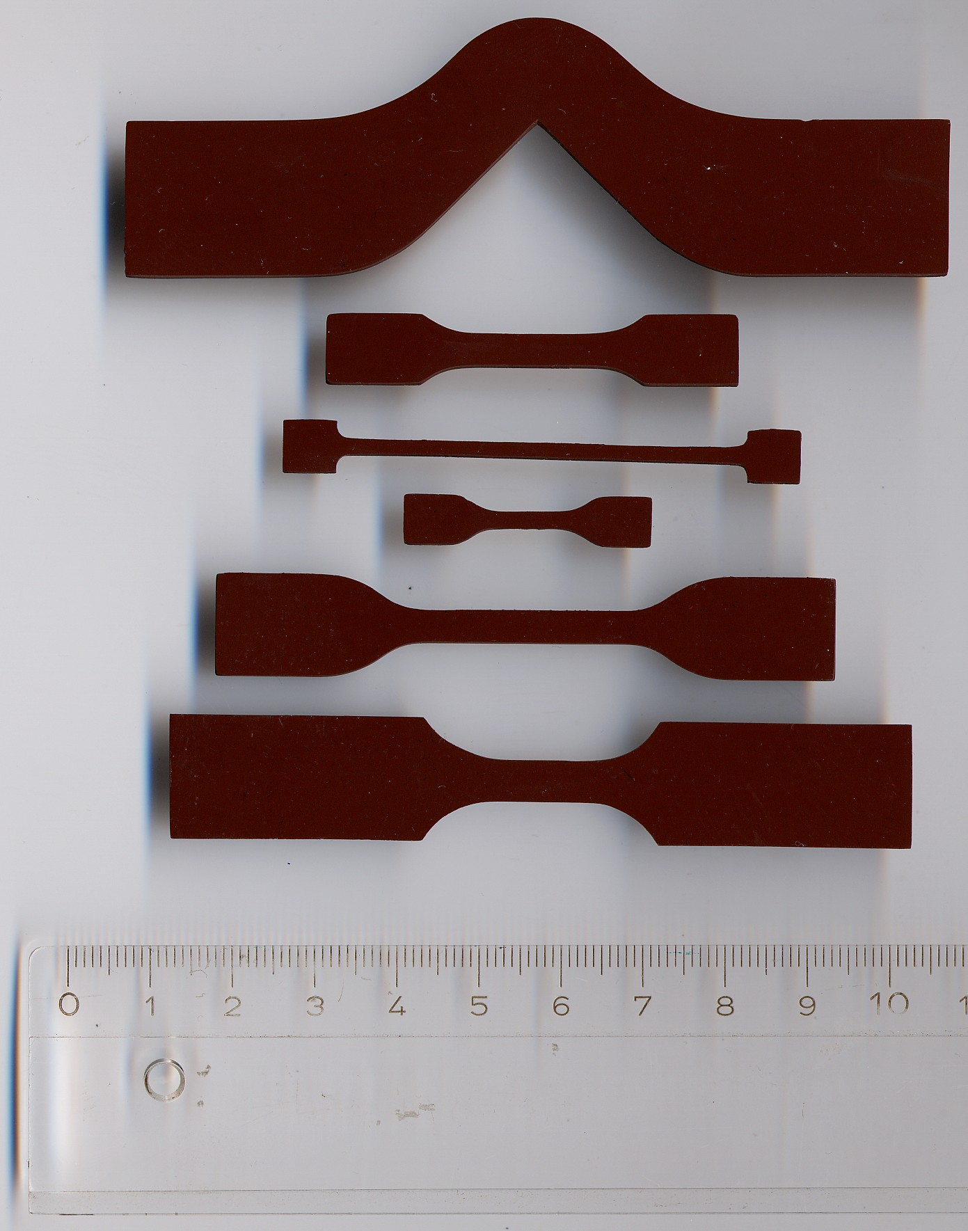 Prüfstäbchen